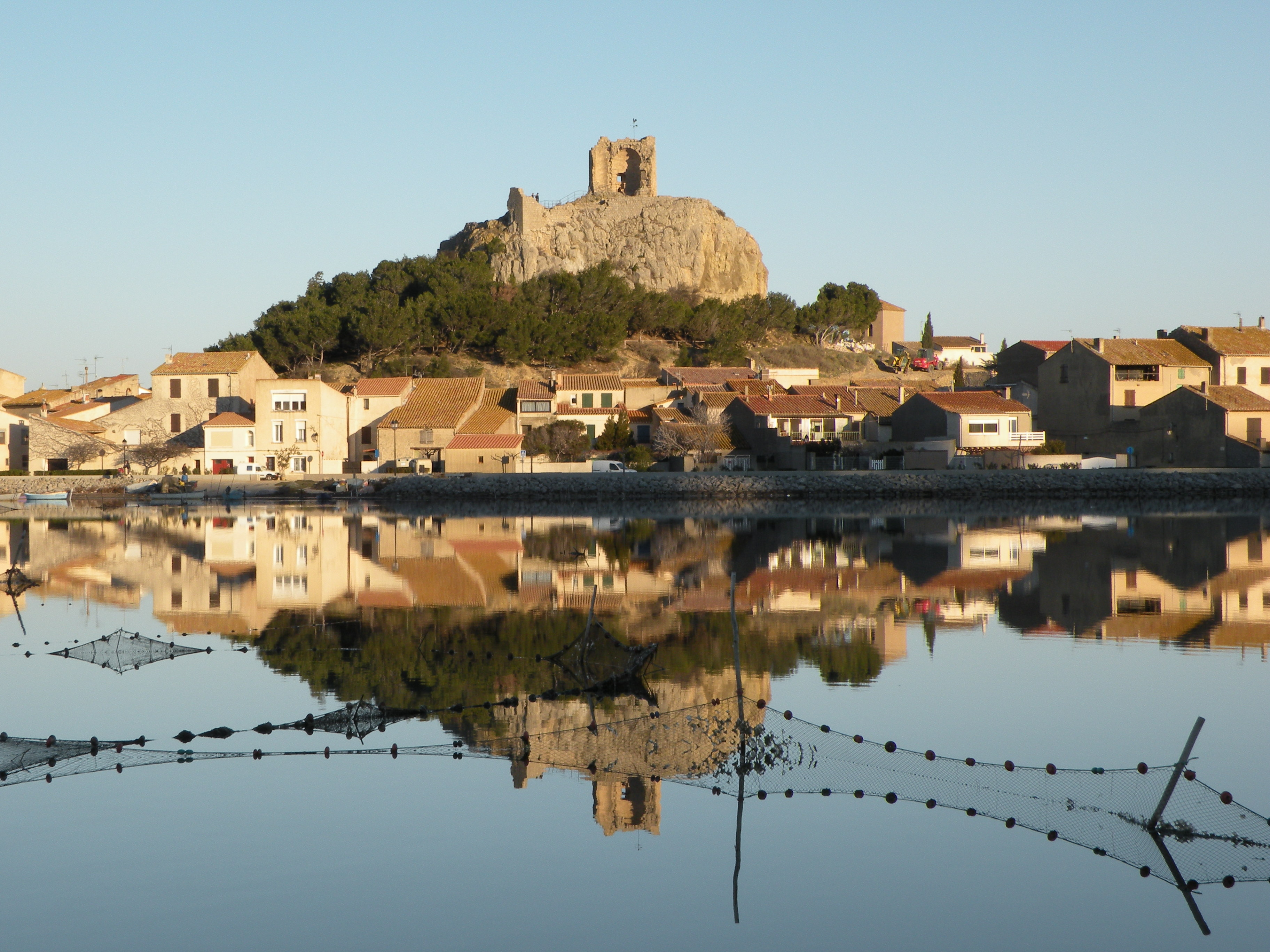 Tour Barberousse, à Gruissan un jour de grand soleil